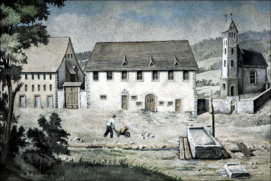 Kirche Embrach von 1446 (eingestürzt 1778) Ein Foto vom Wandgemälde (6x2 Meter) an der Ostwand des Kirchgemeindehauses Embrach.